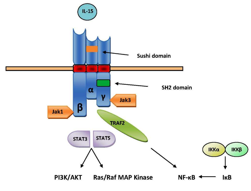 Signalizace IL-15